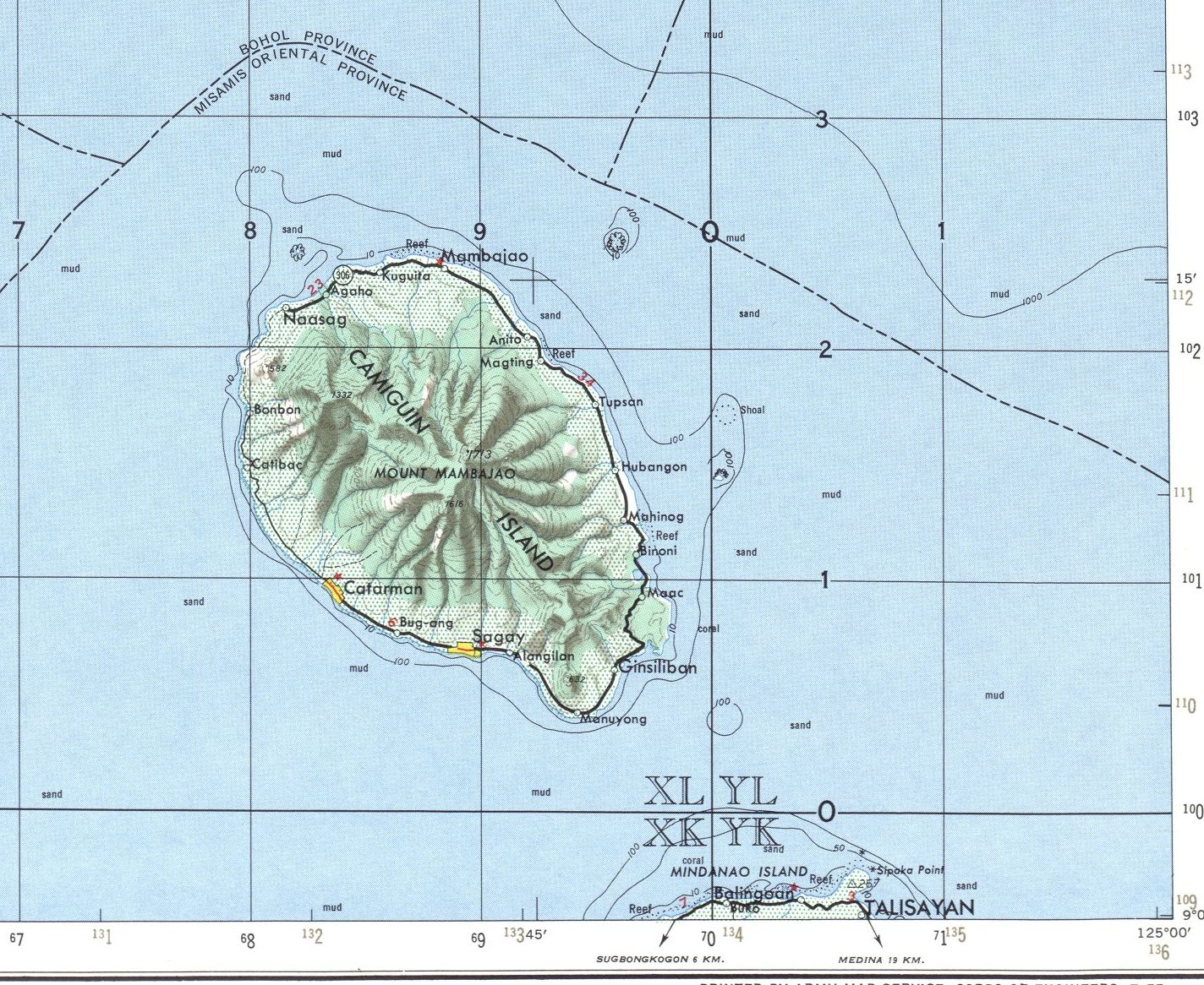 fragmento hoja de ARGAO, 51-11-450, Philippines 1:250,000 Series S501, U.S. Army Map Service, 1954